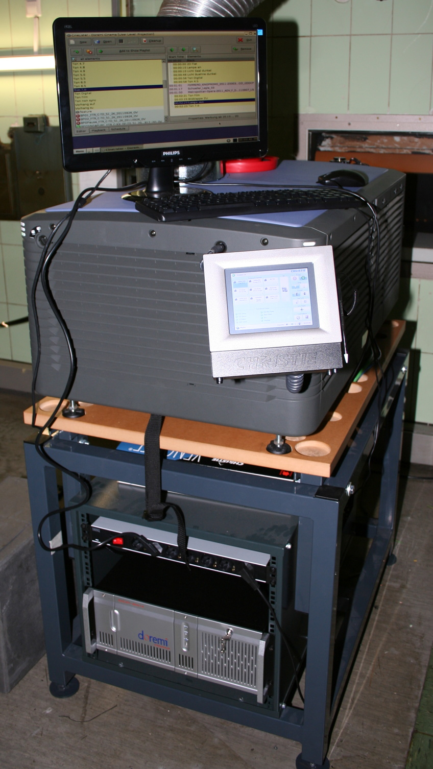 Christie-Projektor mit Kinoserver "Doremi"